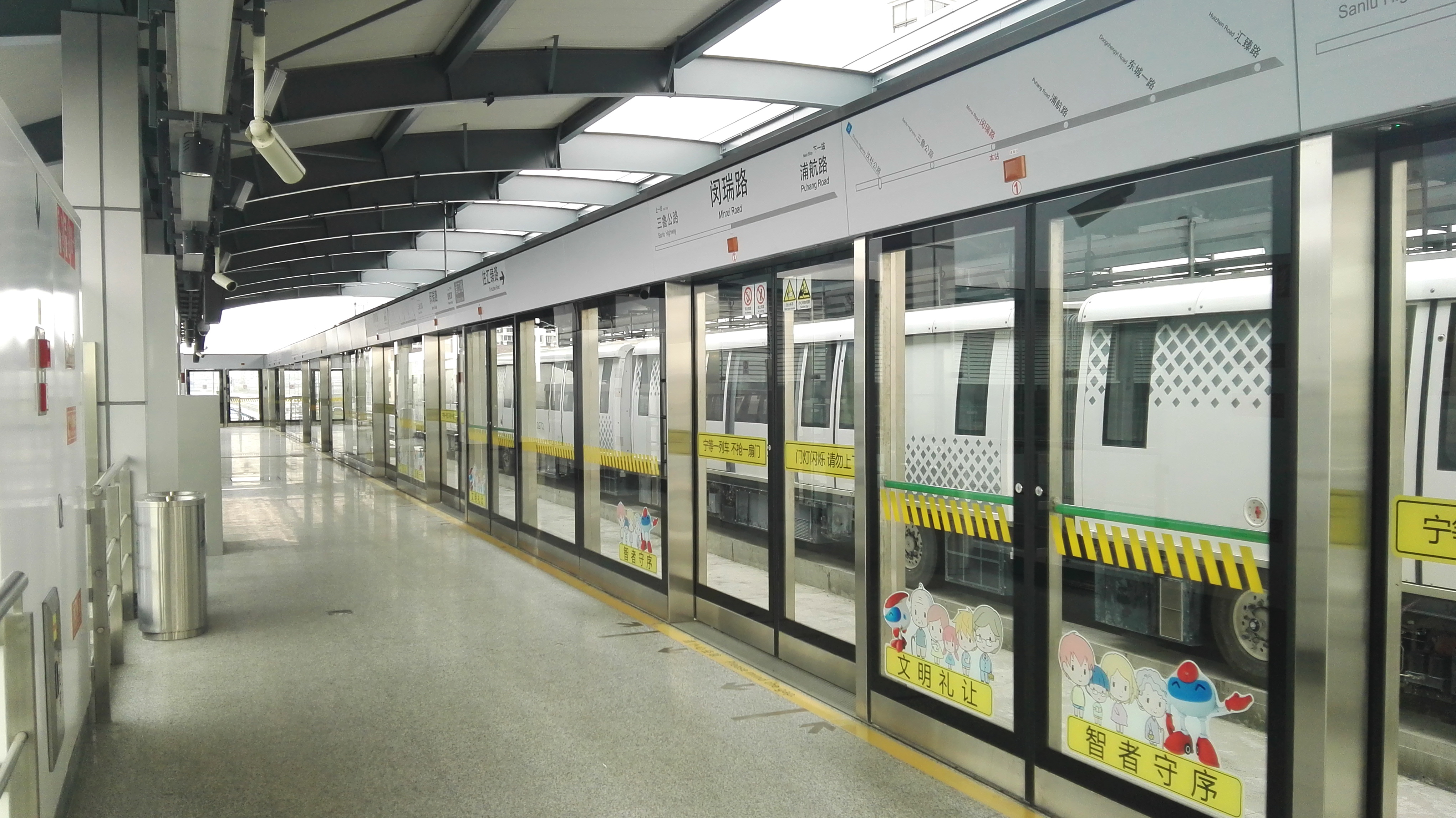 闵瑞路站汇臻路方向站台。